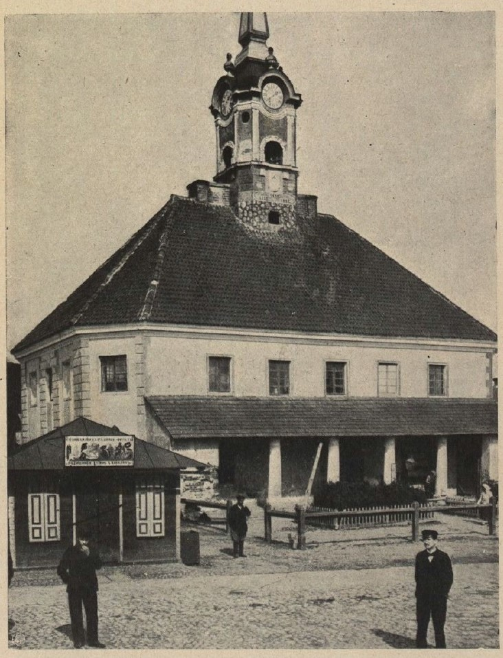 Materiały z wystawy Architektury Polskiej, urządzonej w 1915 r. staraniem Koła Architektów i Towarzystwa Opieki nad Zabytkami Przeszłości w Warszawie.